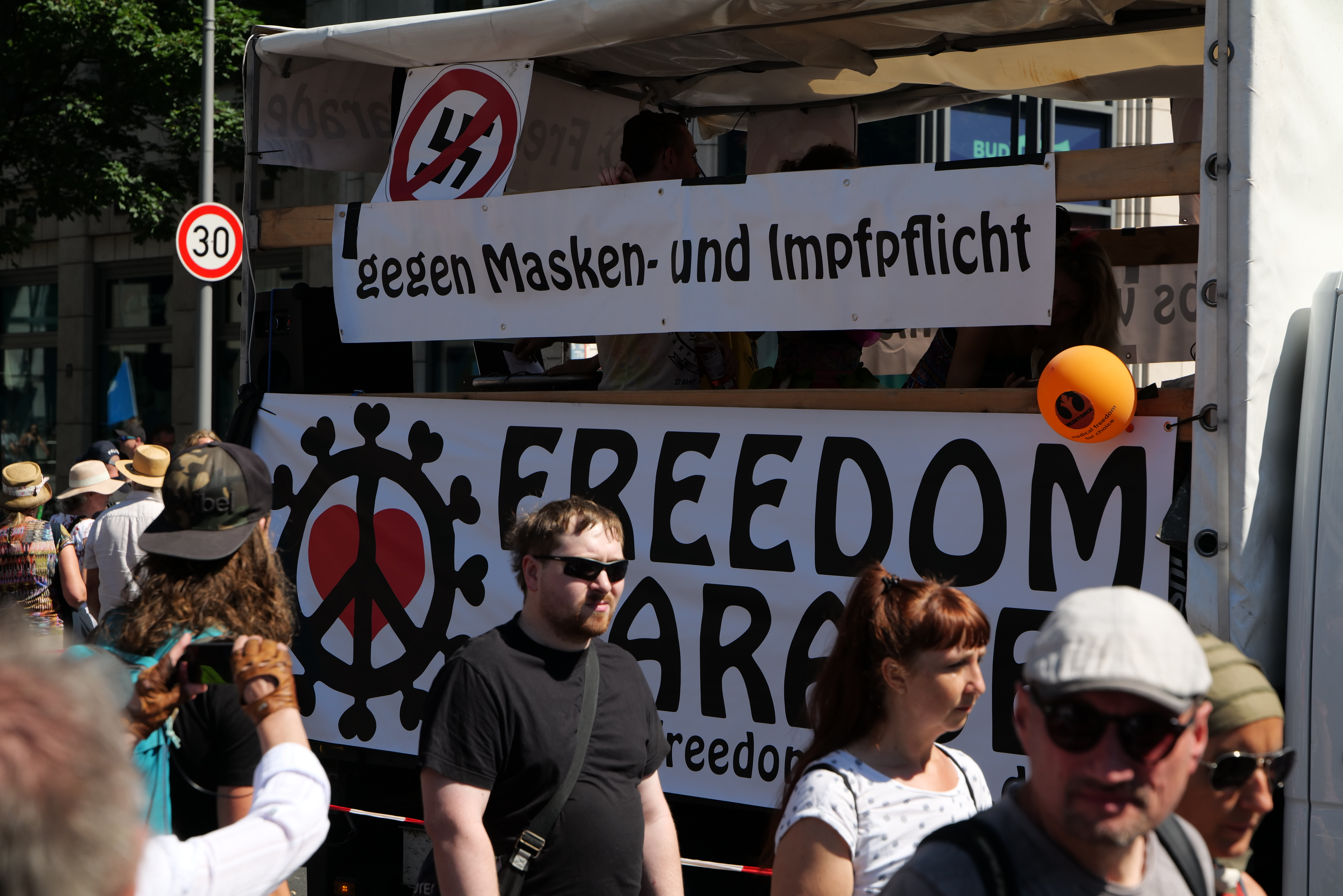 Demonstration von und Verschwörungsgläubigen und Rechtsextremen unter dem Motto „Tag der Freiheit – Das Ende der Pandemie“ gegen die Schutzmaßnahmen gegen das Coronavirus, gegen die bei der Demonstration demonstrativ verstoßen wurde, was zur formalen Auflösung der Demonstration und anschließenden Kundgebung führte am 1. August 2020 in Berlin.